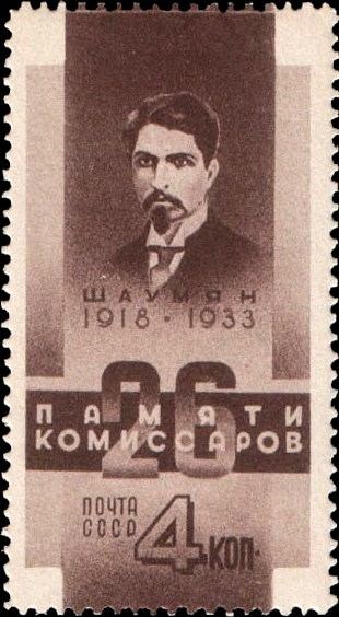 25-летие со дня гибели 26 бакинских комиссаров: С. Г. Шауиян. Почтовая марка СССР, 1933